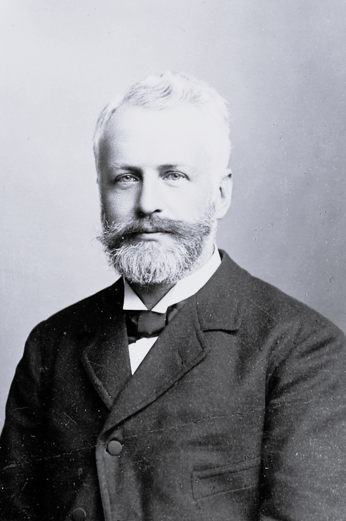 Hermann Deecke um 1891